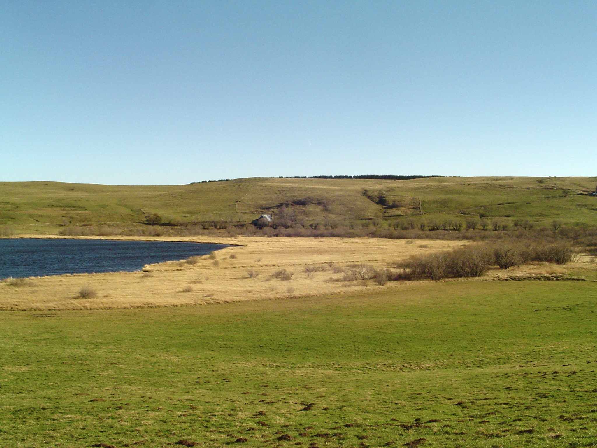 vue du tremblant à Carex lasiocarpa, sur la tourbière du Lac-d'en-Bas de La Godivelle, département du Puy-de-Dôme, France.